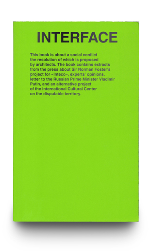 Книга INTERFACE